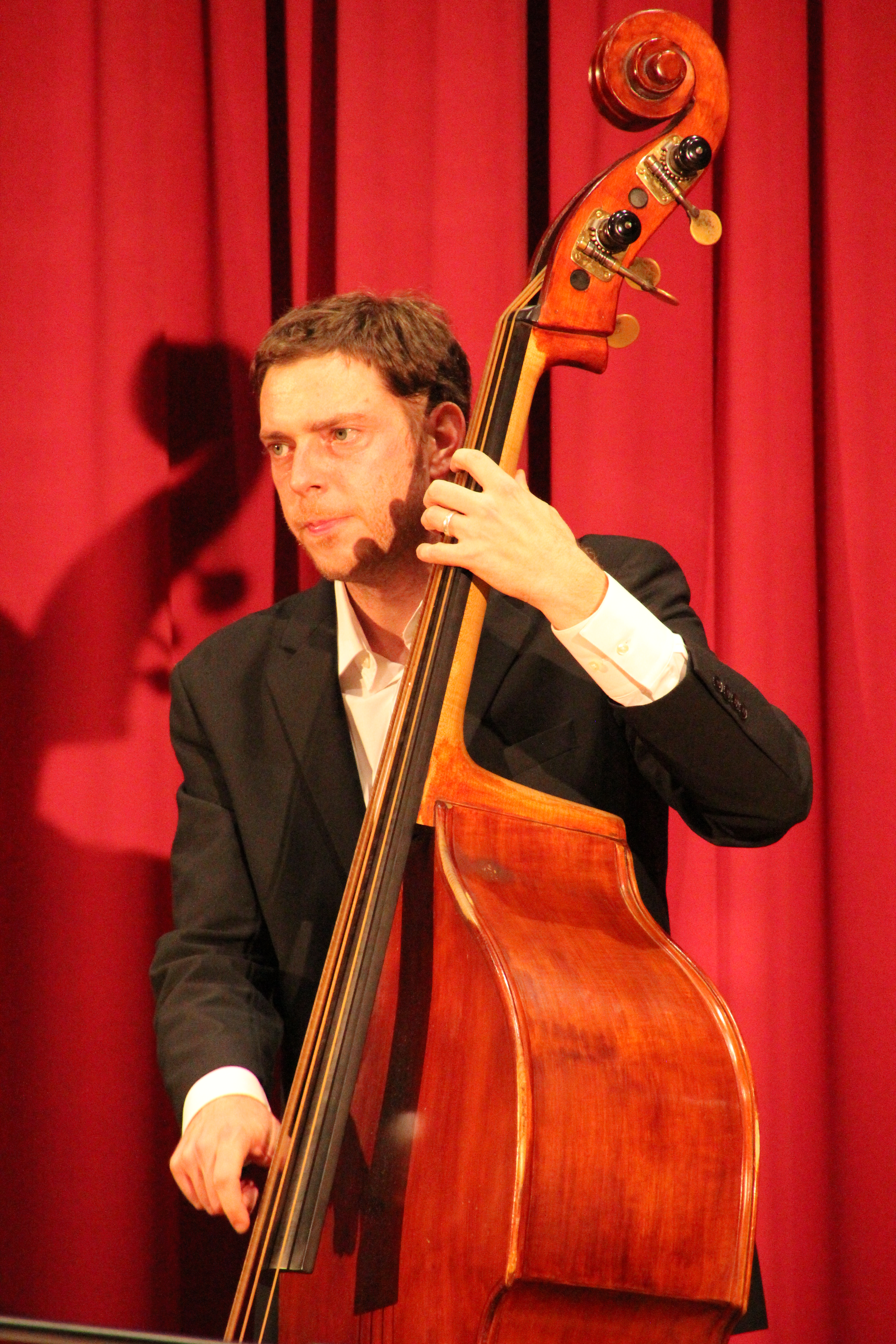 Bildinhalt: "Swing tanzen verboten". Gesprächskonzert mit Emil Mangelsdorff und seinem Quartett in der Stadtbibliothek Hanau. Emil Mangelsdorff - Altsaxophon, Uli Partheil - Piano, Jean-Philippe Walde - Bass, Janusz Stefanski - Drums Aufnahmeort: Hanau, Deutschland